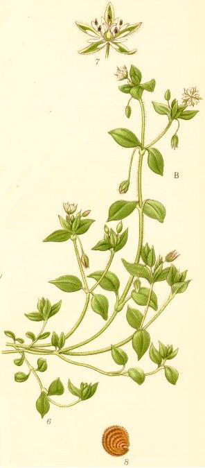 Våtarv (Stellaria media) 6 stjälktoppar i blom och frukt 7 blomma av en form med fem ståndare (3/1) 8 frö (10/1)